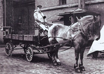 Friedrich Rudolph Andreas Neumüller kör ut firmans öl under en strejk